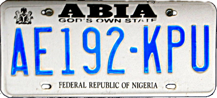 Targa automobilistica nigeriana